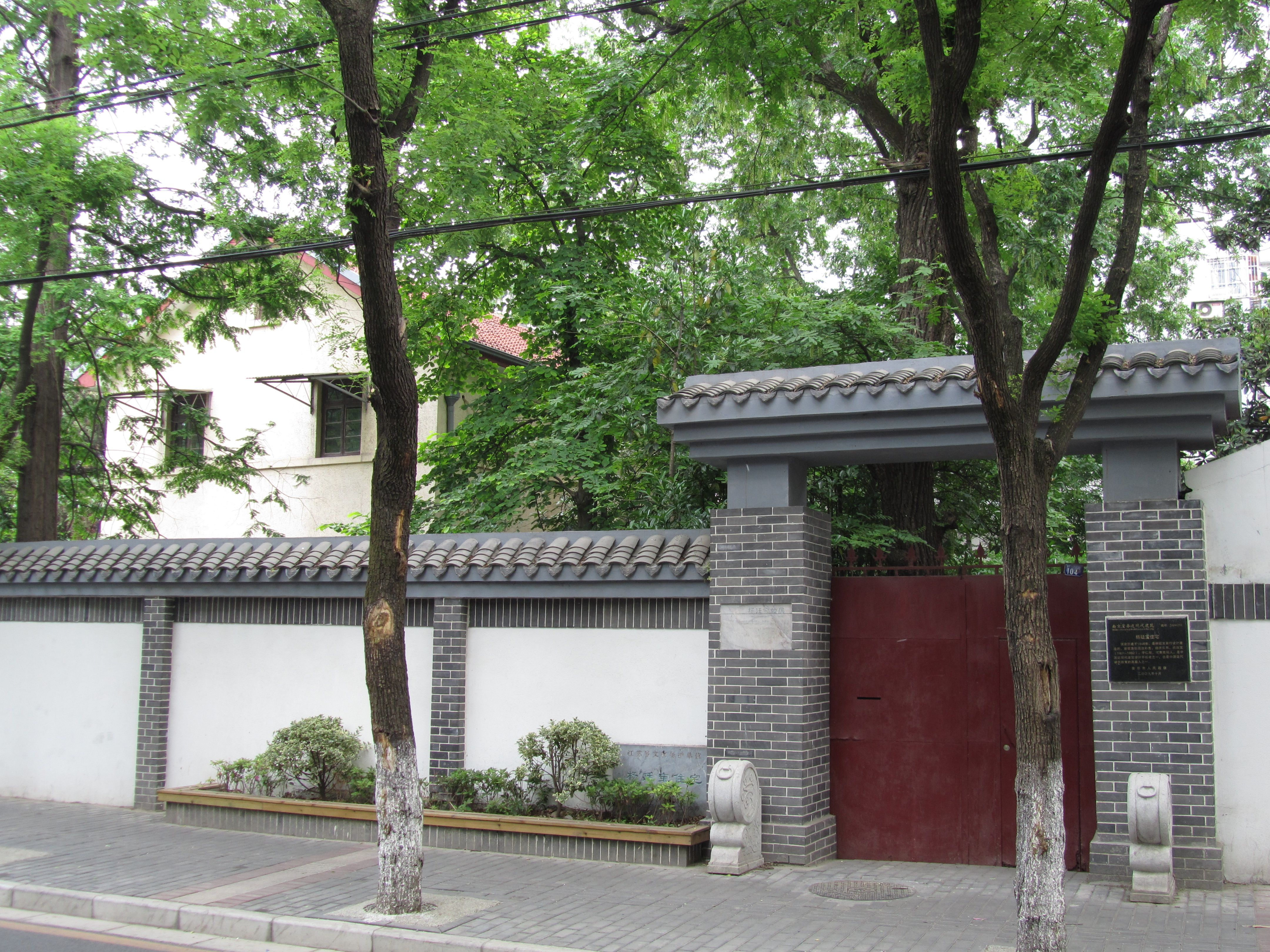 南京成贤街杨廷宝故居。